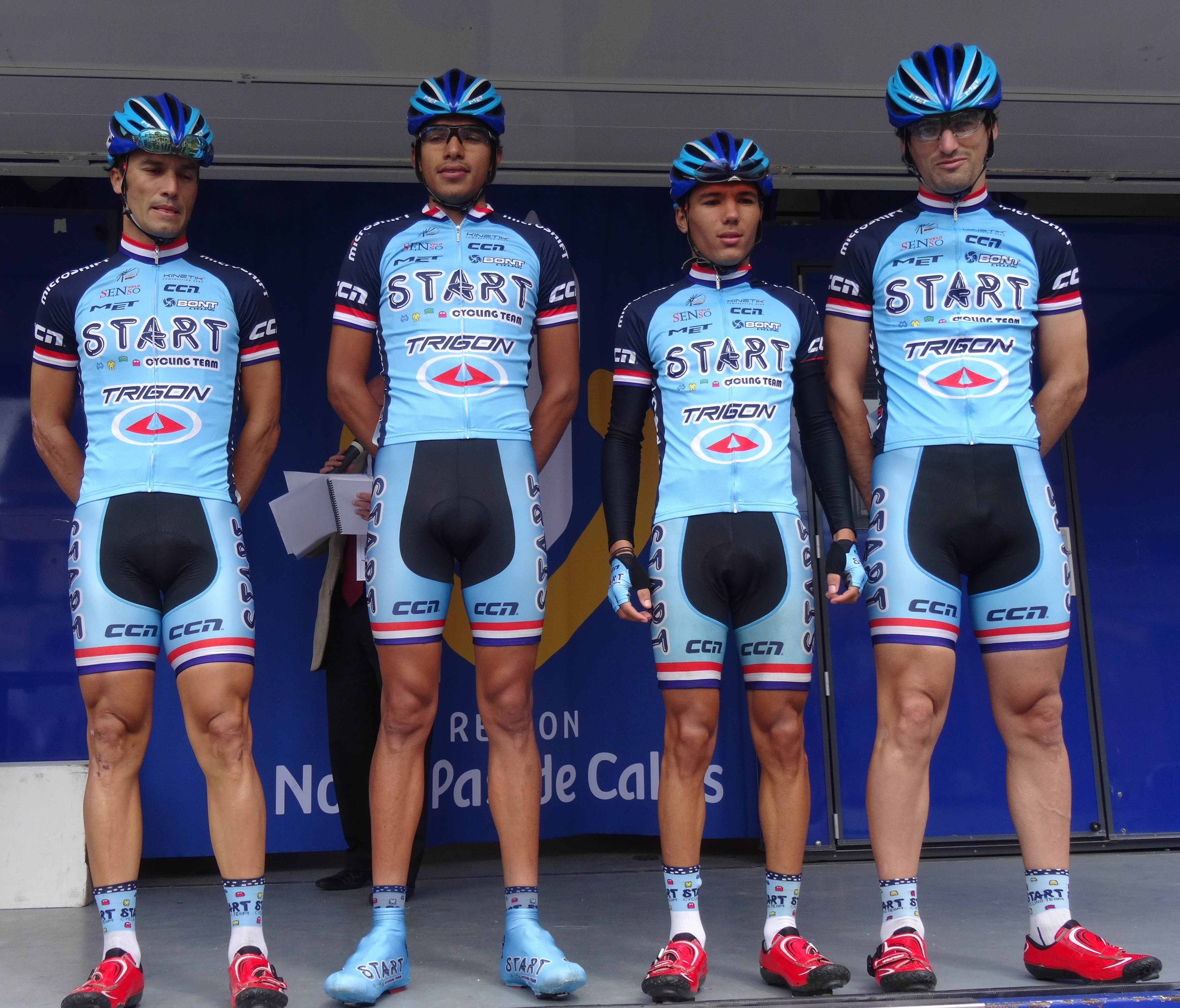 Reportage photographique réalisé le dimanche 13 juillet à l'occasion du départ et de l'arrivée de la Ronde pévéloise 2014 à Pont-à-Marcq, Nord-Pas-de-Calais, France.